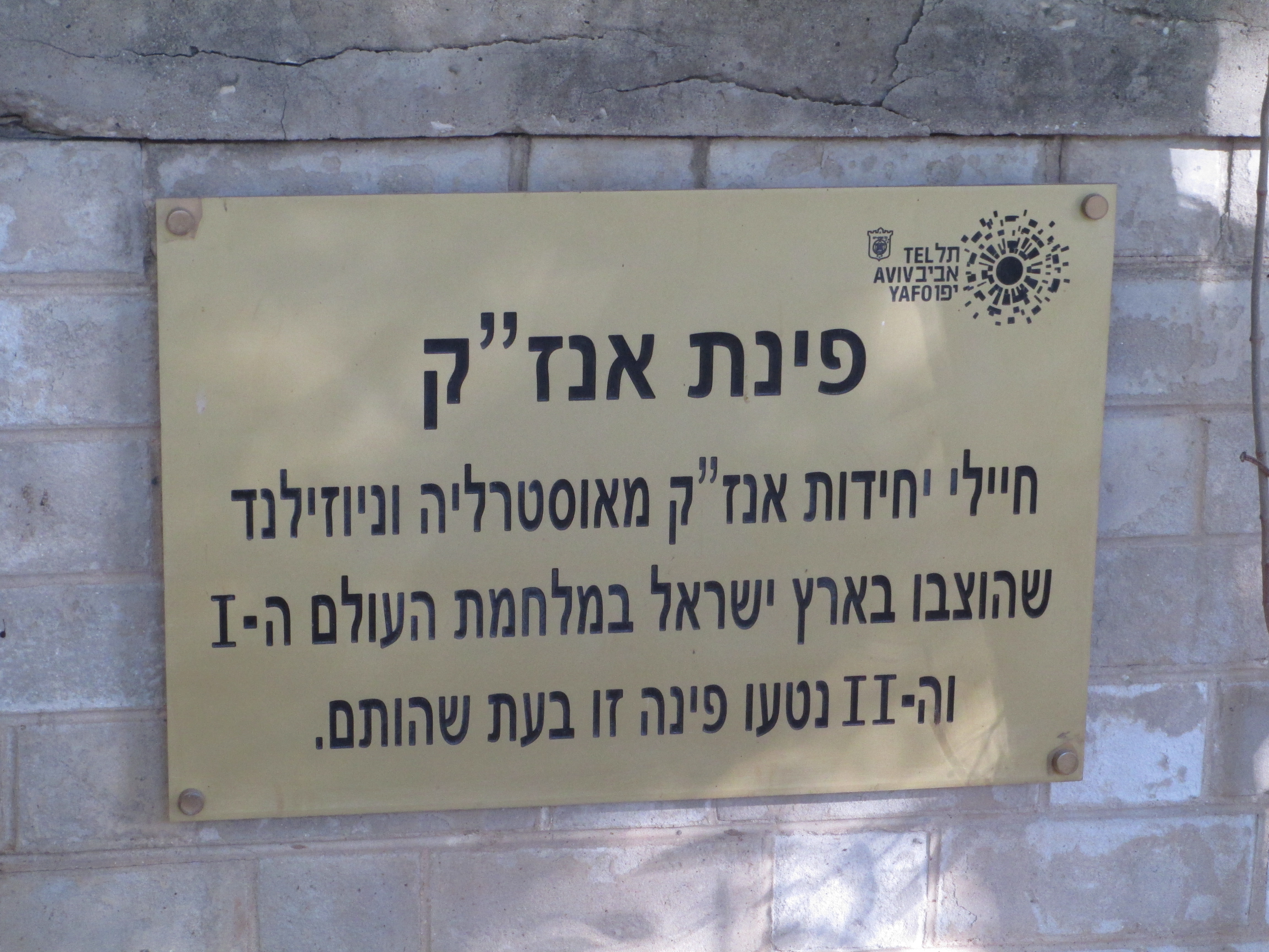 לוחית זיכרון ללוחמי אנז"ק בגן מאיר